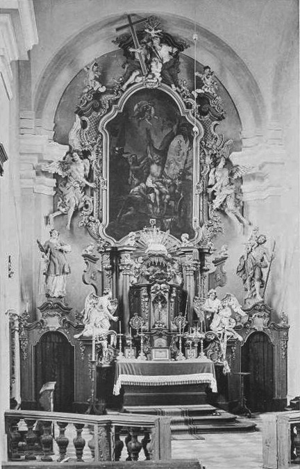 Der Hauptaltar in der Kirche von Königshain bei Ostritz um 1900